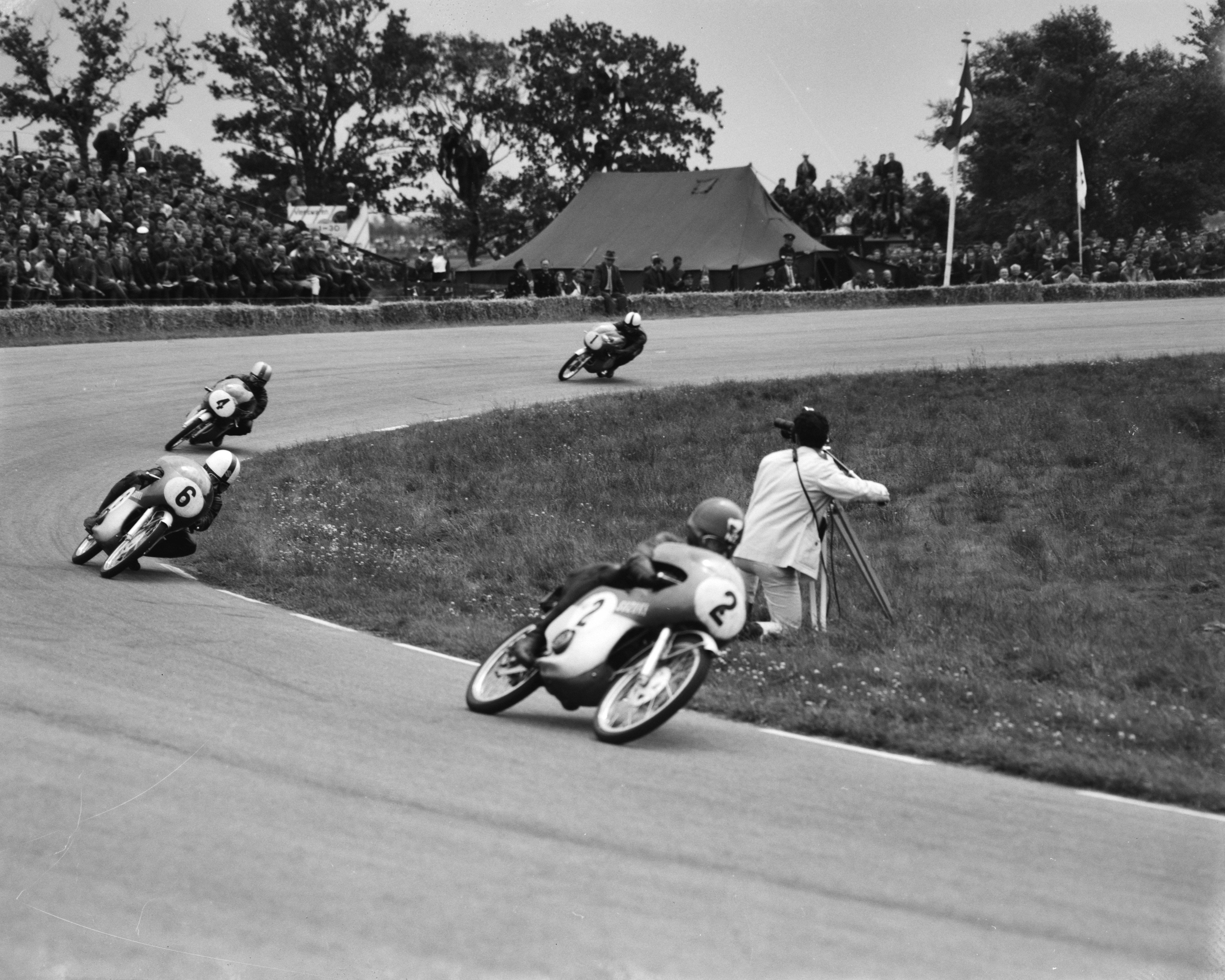 Collectie / Archief : Fotocollectie Anefo Reportage / Serie : TT Assen 1963 Beschrijving : TT te Assen. De 50cc klasse. Anderson, Itoh, Ichino, Degner Datum : 29 juni 1963 Locatie : Assen, Drenthe Trefwoorden : motorsport, motorsport, sport Persoonsnaam : Anderson, Degner, Ichino, Itoh Fotograaf : Bilsen, Joop van / Anefo Auteursrechthebbende : Nationaal Archief Materiaalsoort : Negatief (zwart/wit) Nummer archiefinventaris : bekijk toegang 2.24.01.04 Bestanddeelnummer : 915-3146